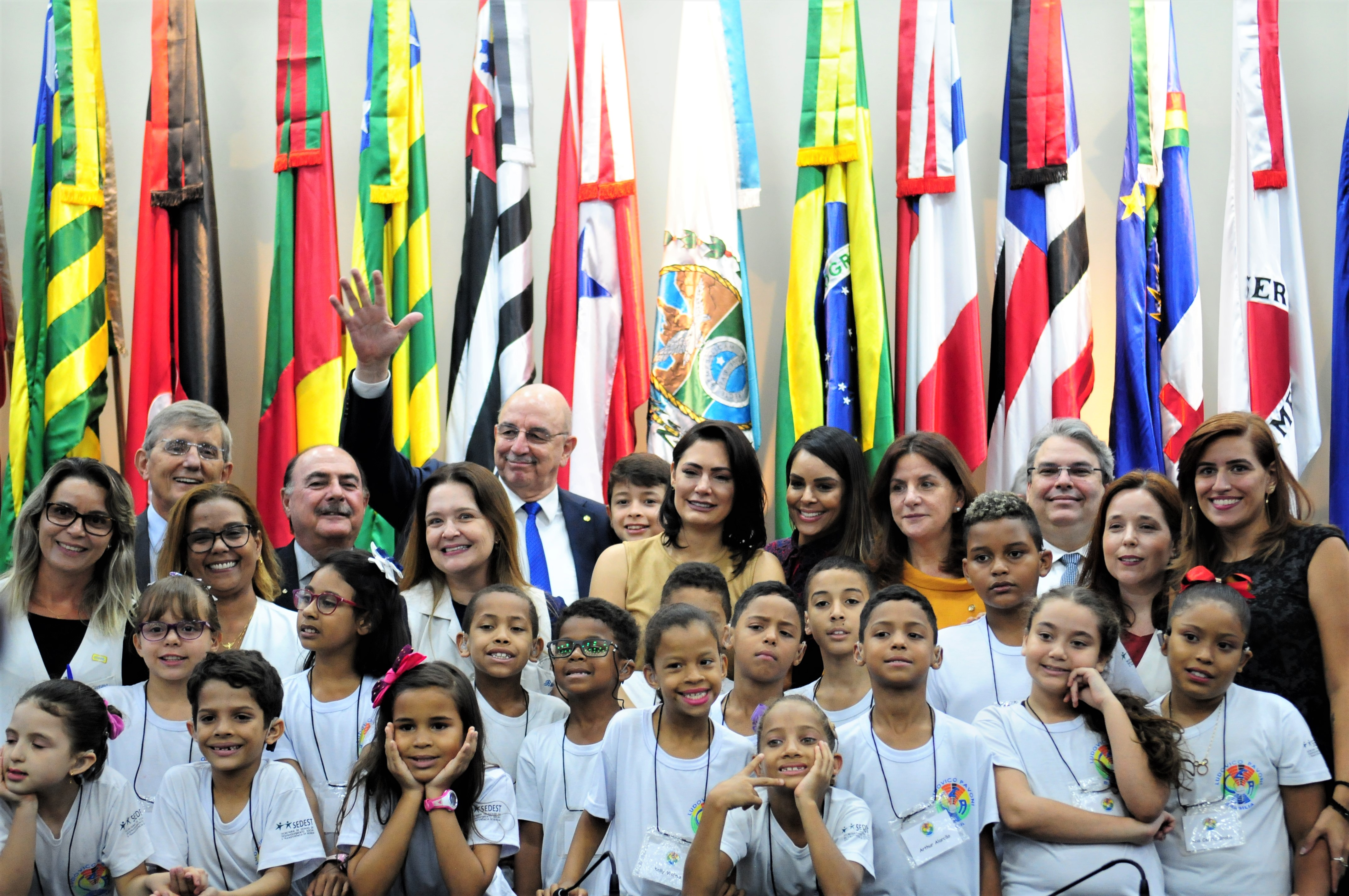 Mantendo a política de integração e convergência nas pautas sociais com o governo federal, a primeira-dama do Distrito Federal, Mayara Noronha, participou da cerimônia de lançamento do Projeto Sinais, nesta quarta-feira (18/12), no auditório do Ministério da Cidadania.